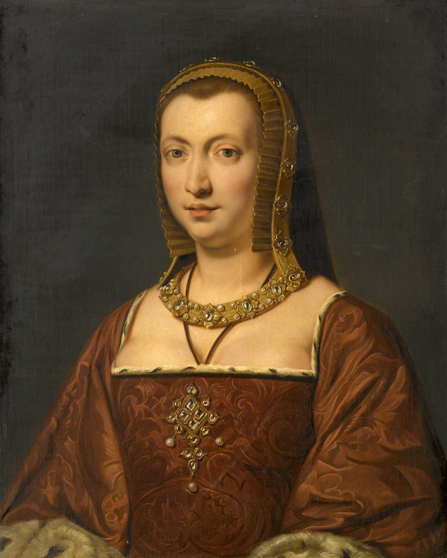 Anne de Bretagne reine de France 1836 par Luigi Rubio